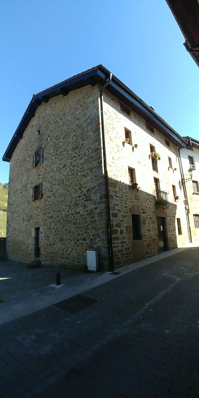 Antzuola, Kalegoi 9 (Montxonenekoa) eraikina ageri da argazkian. Bere egiturari begiratuz gero, kanpoaldean eta barnealdean gotiko tankerakoa dela konturatuko gara; beraz, XV-XVI. mendekoa, eta herriguneari dagokionez, etxerik zaharrena.